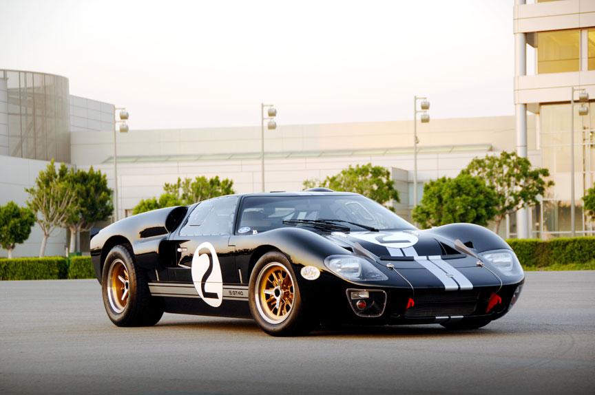 Shelby GT40